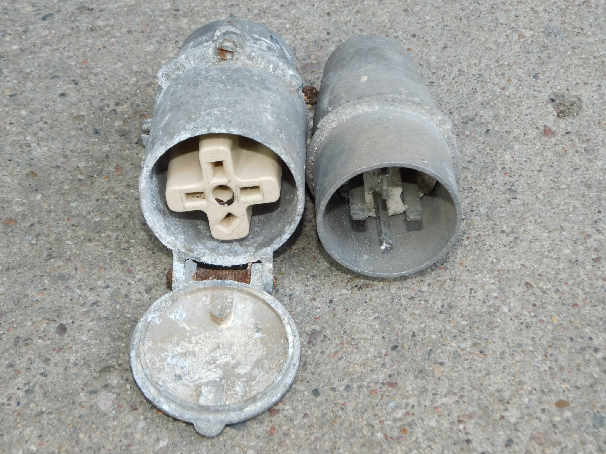 Gniazdo ścienne i wtyczka przenośna trójfazowa 16A 500V z płaskimi bolcami, stosowana dawniej w czasach PRL do zasilania urządzeń o napięciu międzyfazowym 380V. W późniejszym okresie PRL została wyparta przez złącza z okrągłymi bolcami (3P+PE 6h 380V) w aluminiowej obudowie, zgodne z obecną normą IEC/EN 60309.